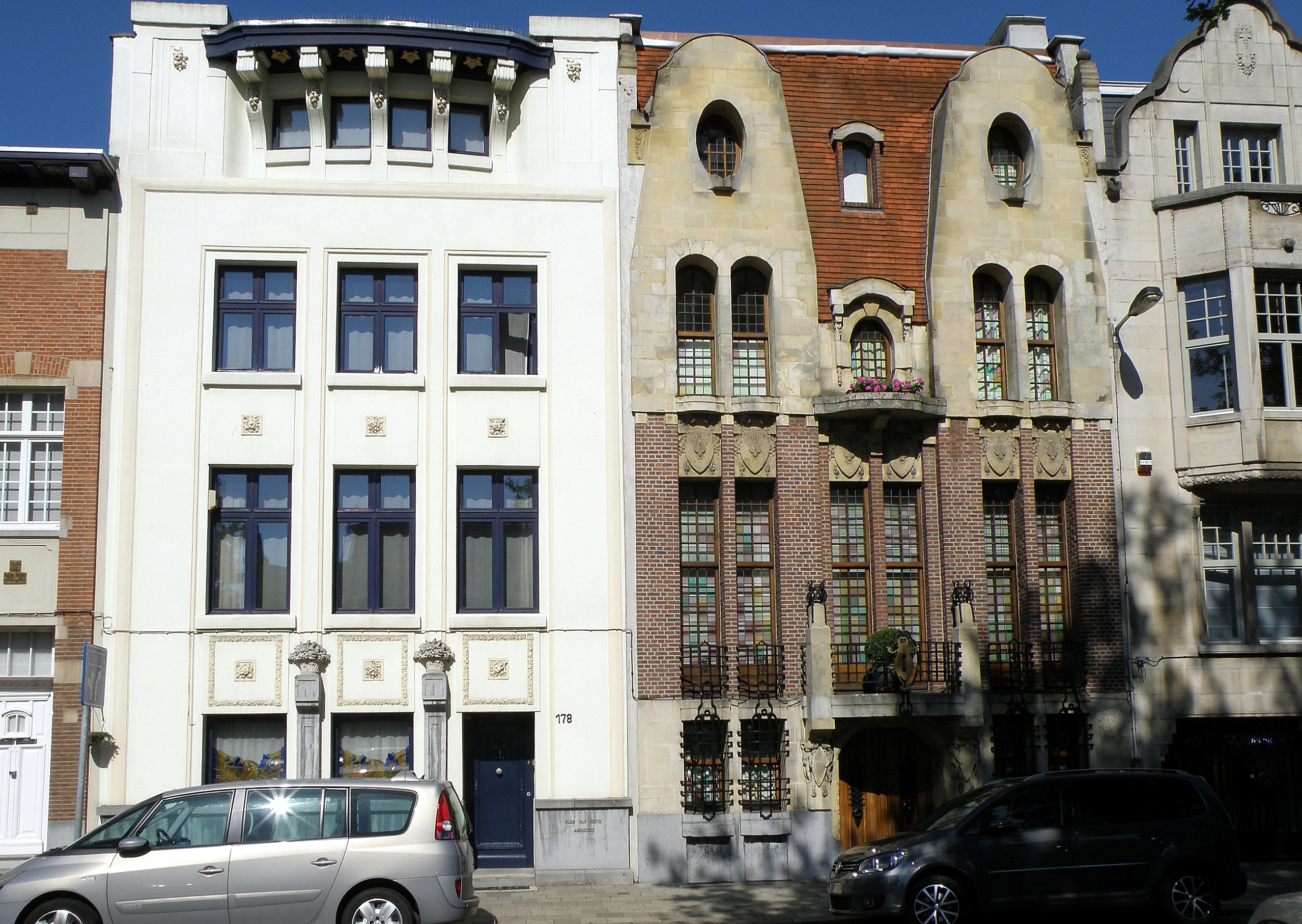 Antwerpen, distr. Deurne. Huis links (wit bepleisterd) is het eigen woonhuis (naar eigen ontwerp) van arch. en schilder Flor Van Reeth, gelegen Boekenberglei nr. 178, gebouwd 1924-26. Huis rechts is het eigen woonhuis (eveneens naar eigen ontwerp) van architect Jef Huygh, genaamd De Liana-Halle, anno 1923.